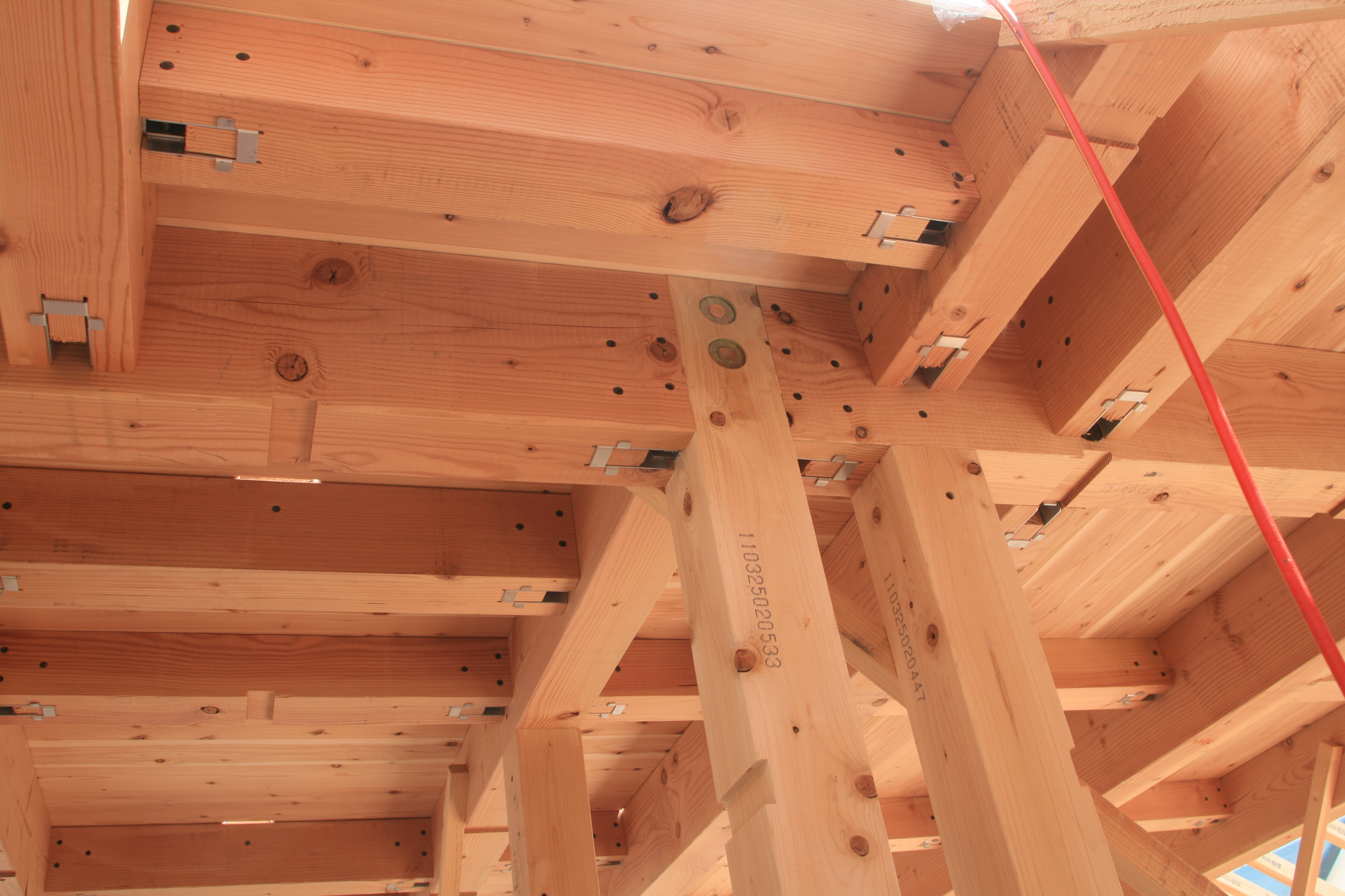 ドリフトピンによって結合された梁と柱。構造用合板の代わりに、トライウッドパネル（杉無垢＿幅ハギ集成パネル）が使用されている。